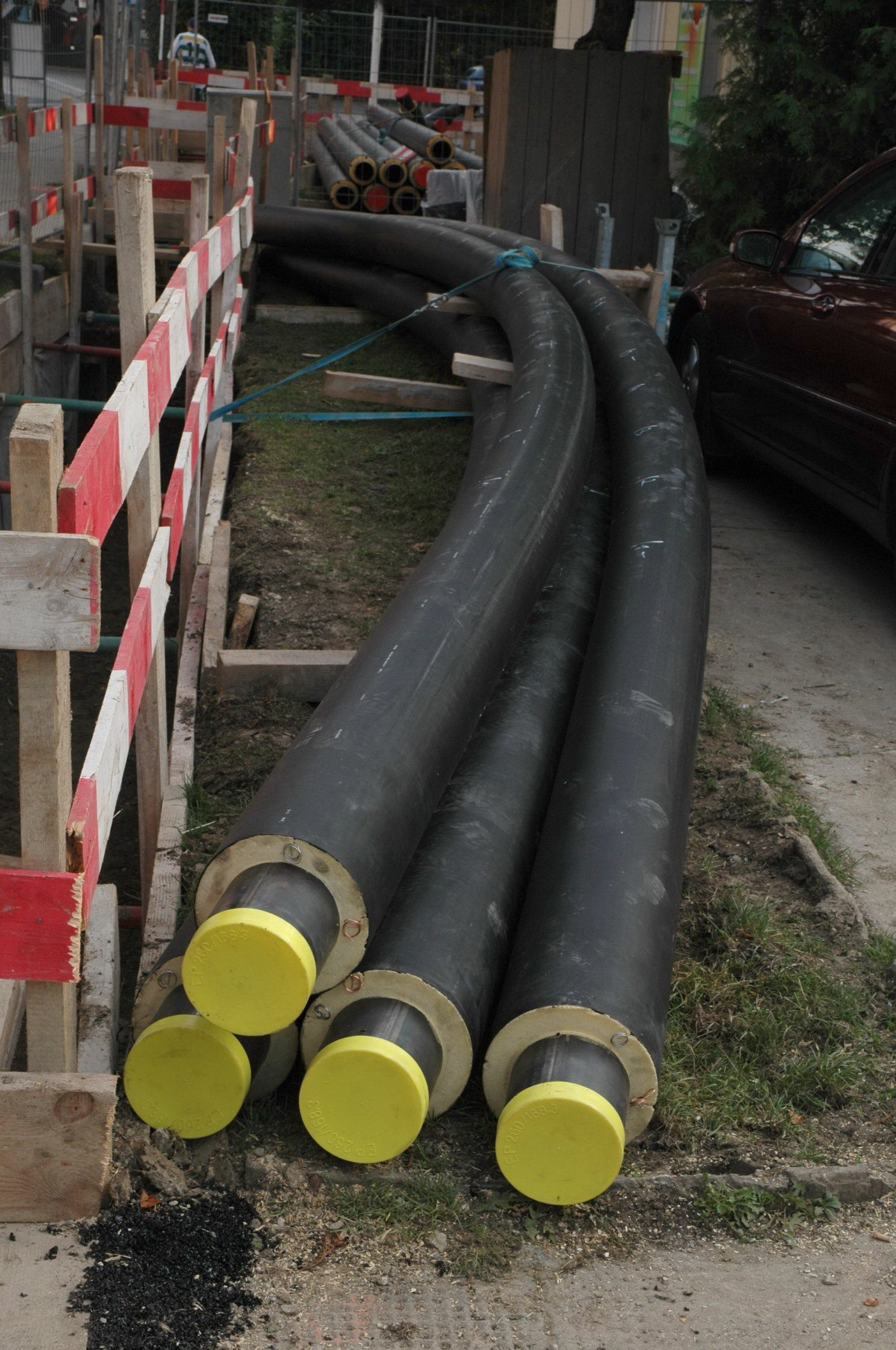 Kunstsoffmantelrohr einer Fernwärmebaustelle in Wien, Im Vordergrund DN 150 Bogenrohr der Fa. Isoplus, Im Hintergrund DN 150 gerade Rohre der Firma Ahlstrom vormals Ahlström, links vorbildlich abgesicherte Baustelle und ausgezeichnetem Grabenverbau